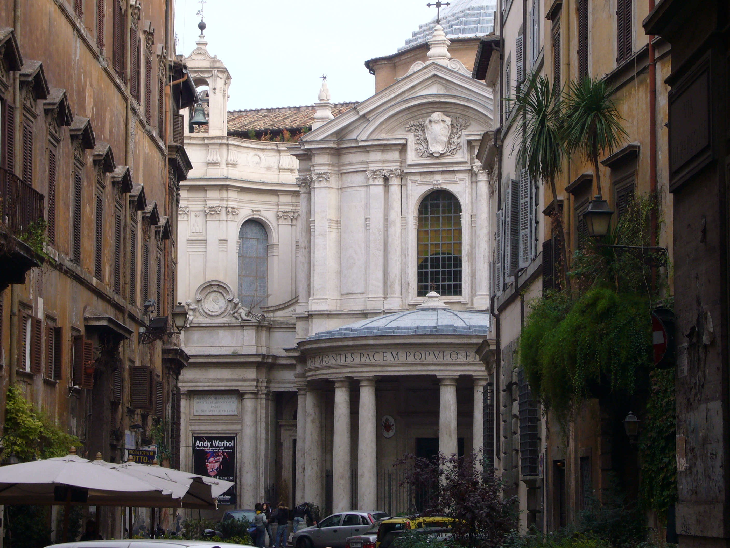 Roma, via della Pace e S. Maria della Pace. A sinistra, palazzo Gambirasi.